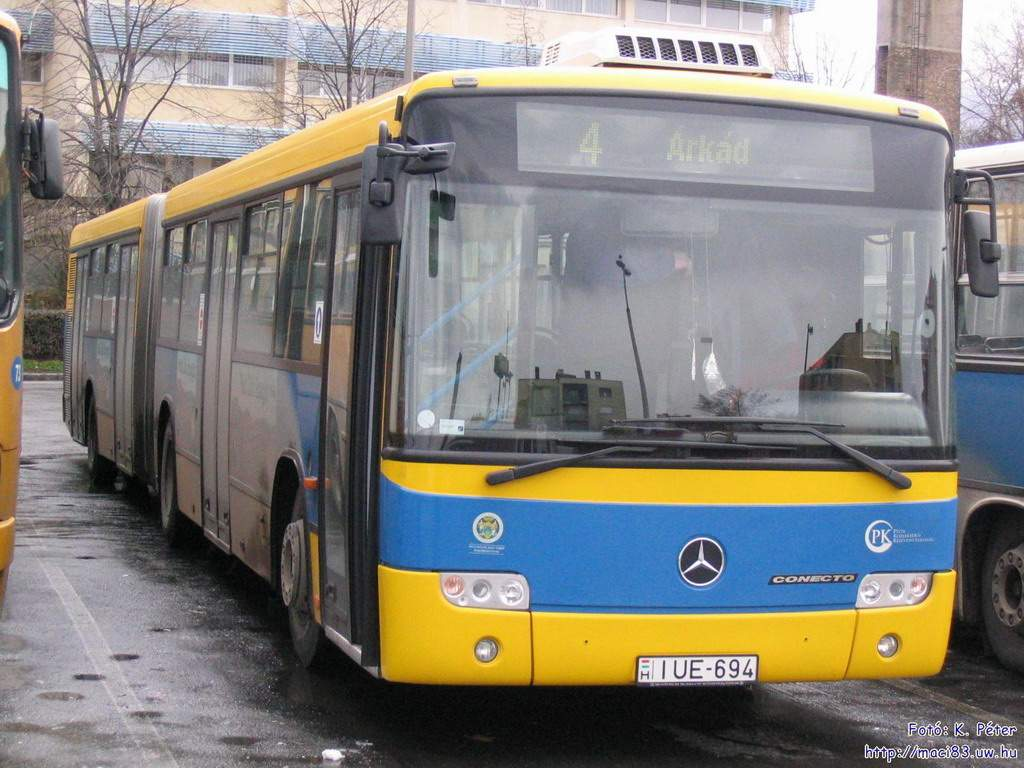 A pécsi 4-es számú busz